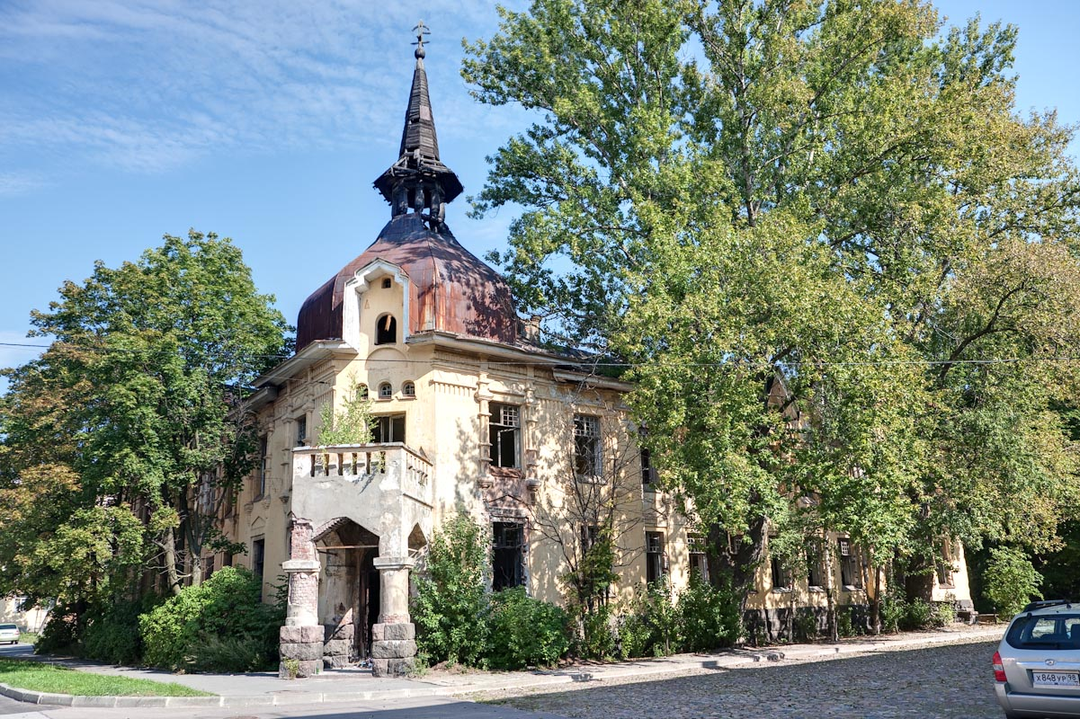 ул.Пролетарская,30: Дом общины сестёр милосердия; 29.08.2009